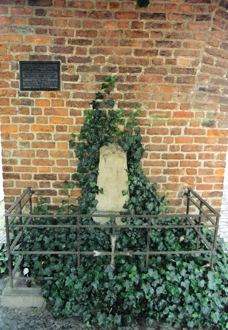 Stralsund, Denkmal für die Schill'schen Husaren am Kniepertor (2005-07-xx); Autor: Benutzer:Klugschnacker